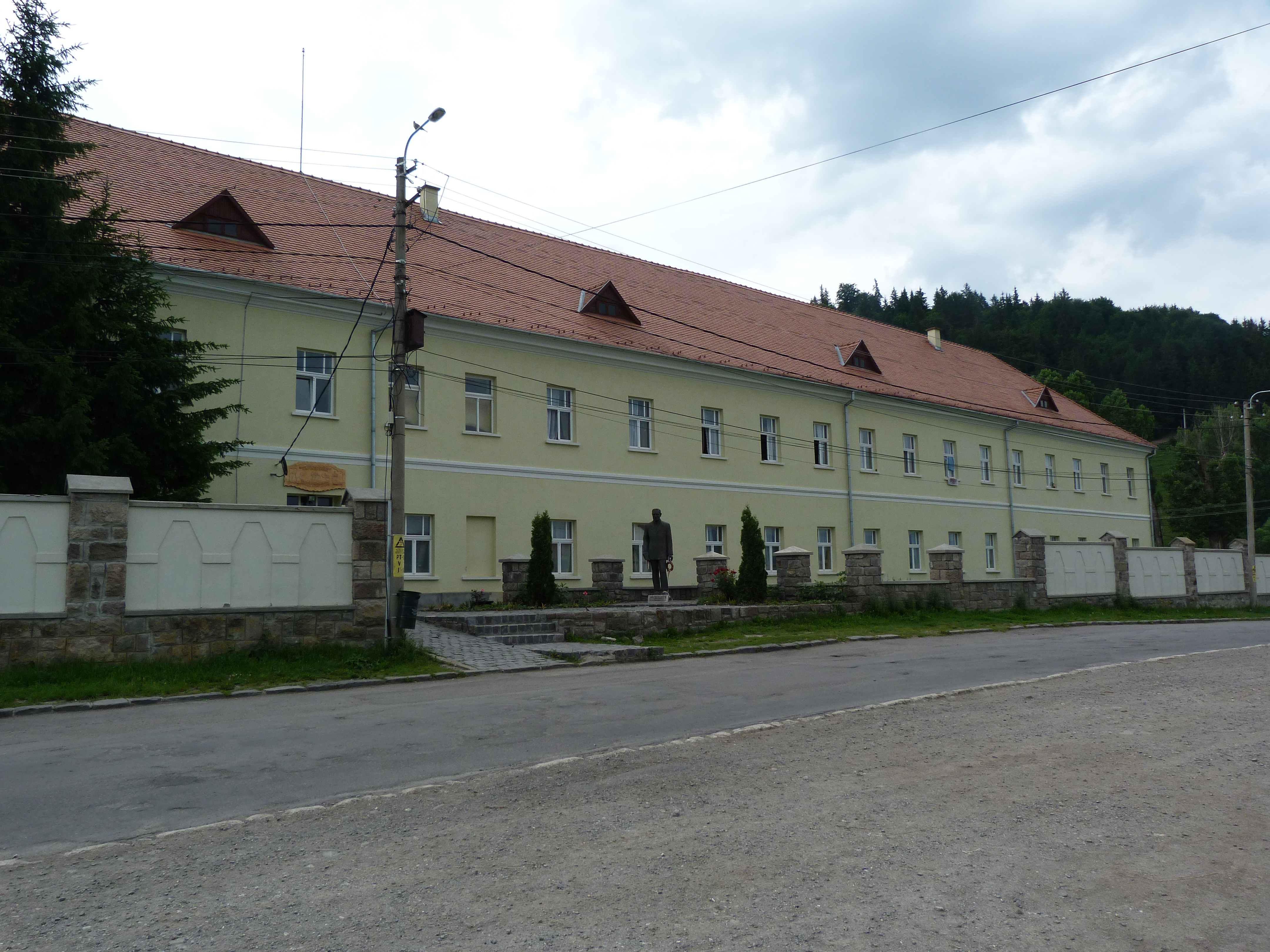 A felvétel 2013. Június 19 –én készült Csíksomlyón (Csíkszereda). Ferences Kolostor. ©© Derzsi Elekes Andor, Budapest, 2013, You are authorised to use this photo under Creative Commons – even for commercial, for profit purposes. The photo must be attributed to Derzsi Elekes Andor. All of the photos and vids in the Metapolisz DVD line are under Creative Commons and can be used even for commercial – for profit – purposes. Recommended Citation Derzsi Elekes Andor: Metapolisz DVD line Time: mashine time + 1 hour.